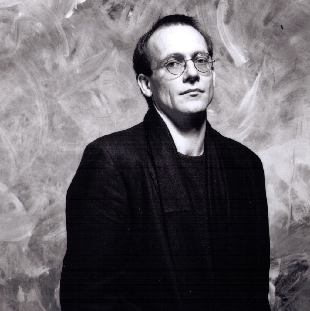 schwarz-weiß Aufnahme von Dieter Hinz vor einer von Ihm selbst gestalteten Kulisse mit Elementen der Wischtechnik kombiniert mit der Negativdarstellung der Schwarzweißfotografie.